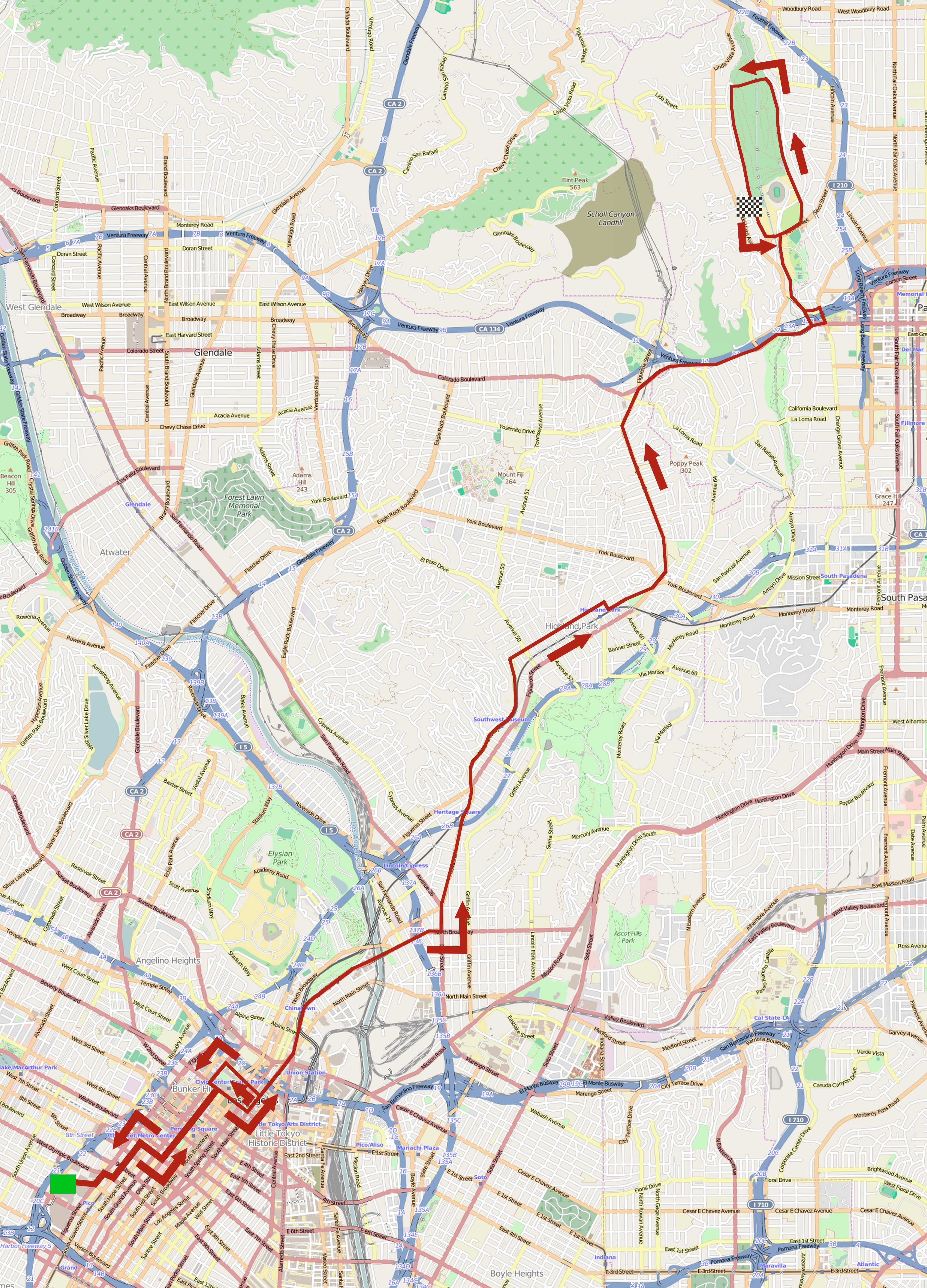 Parcours de la huitième étape du Tour de Californie 2015. This map may be incomplete, and may contain errors. Don't rely solely on it for navigation.